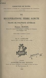 Bild von einer Neuauflage Pierre Dubios aus dem Jahr 1891, A. Picard